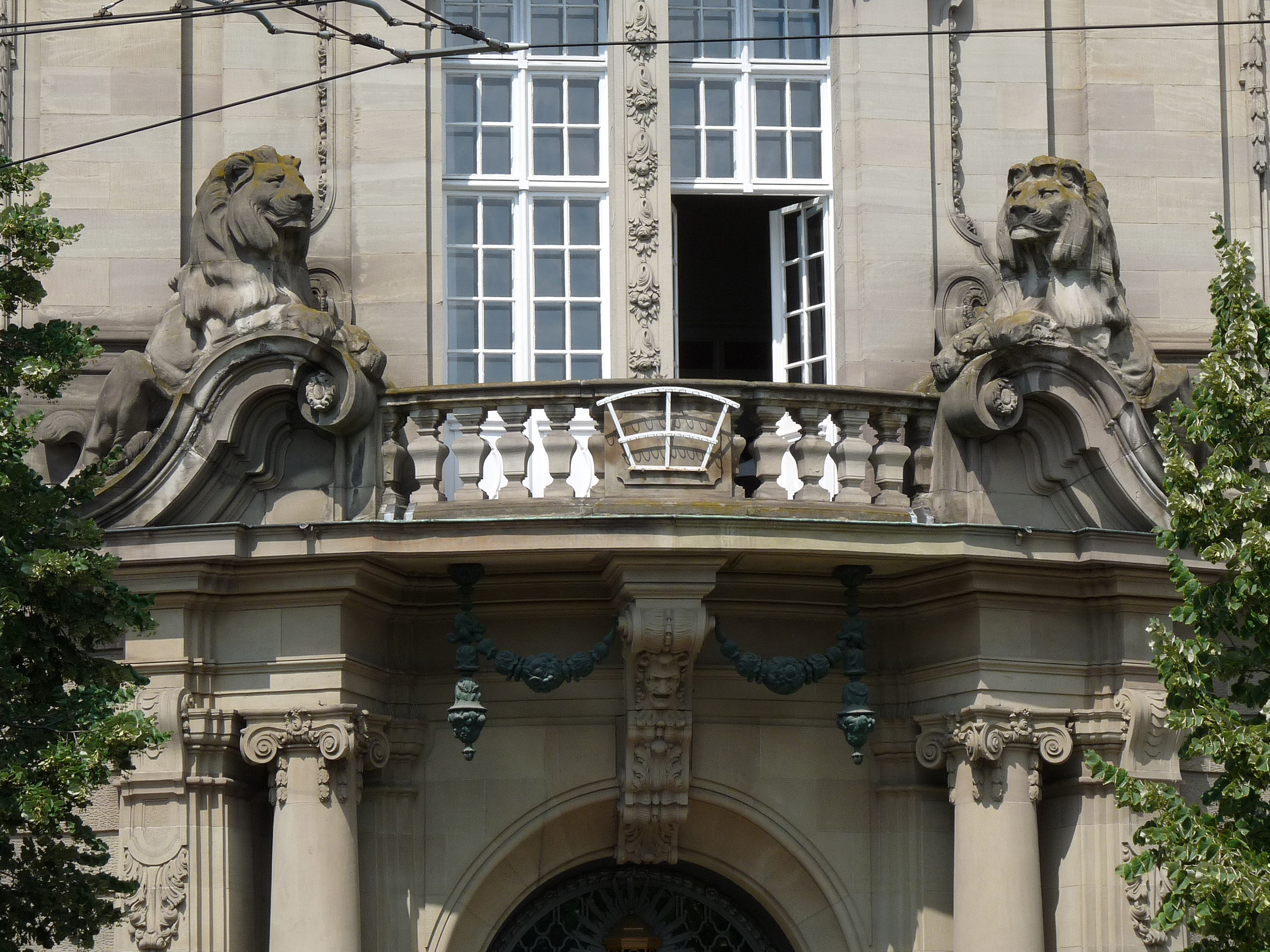 Strasbourg, portail de la Préfecture : lions d'Alfred Marzolff (1911)